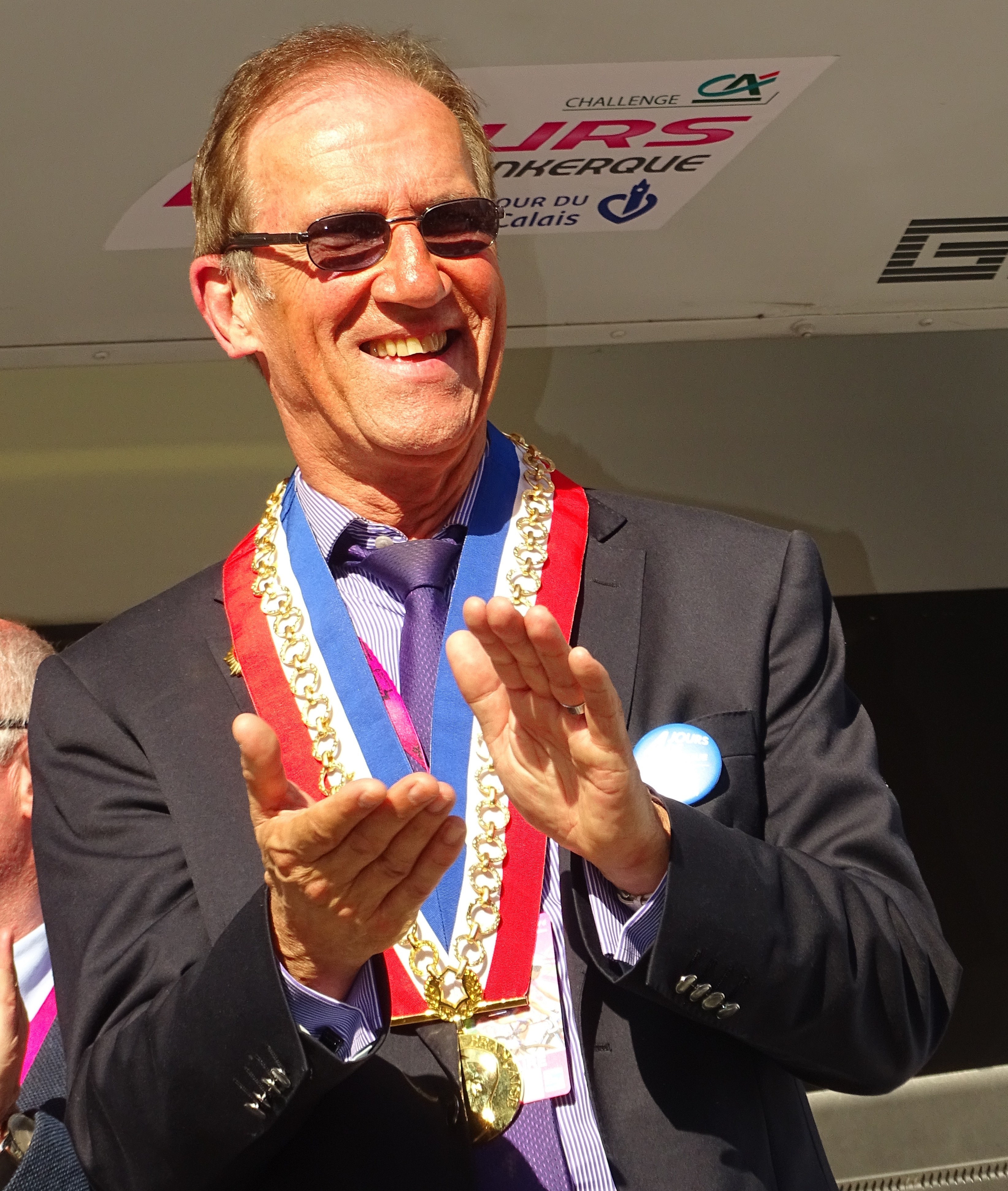 Template:Marc Hémez, maire d'Aniche